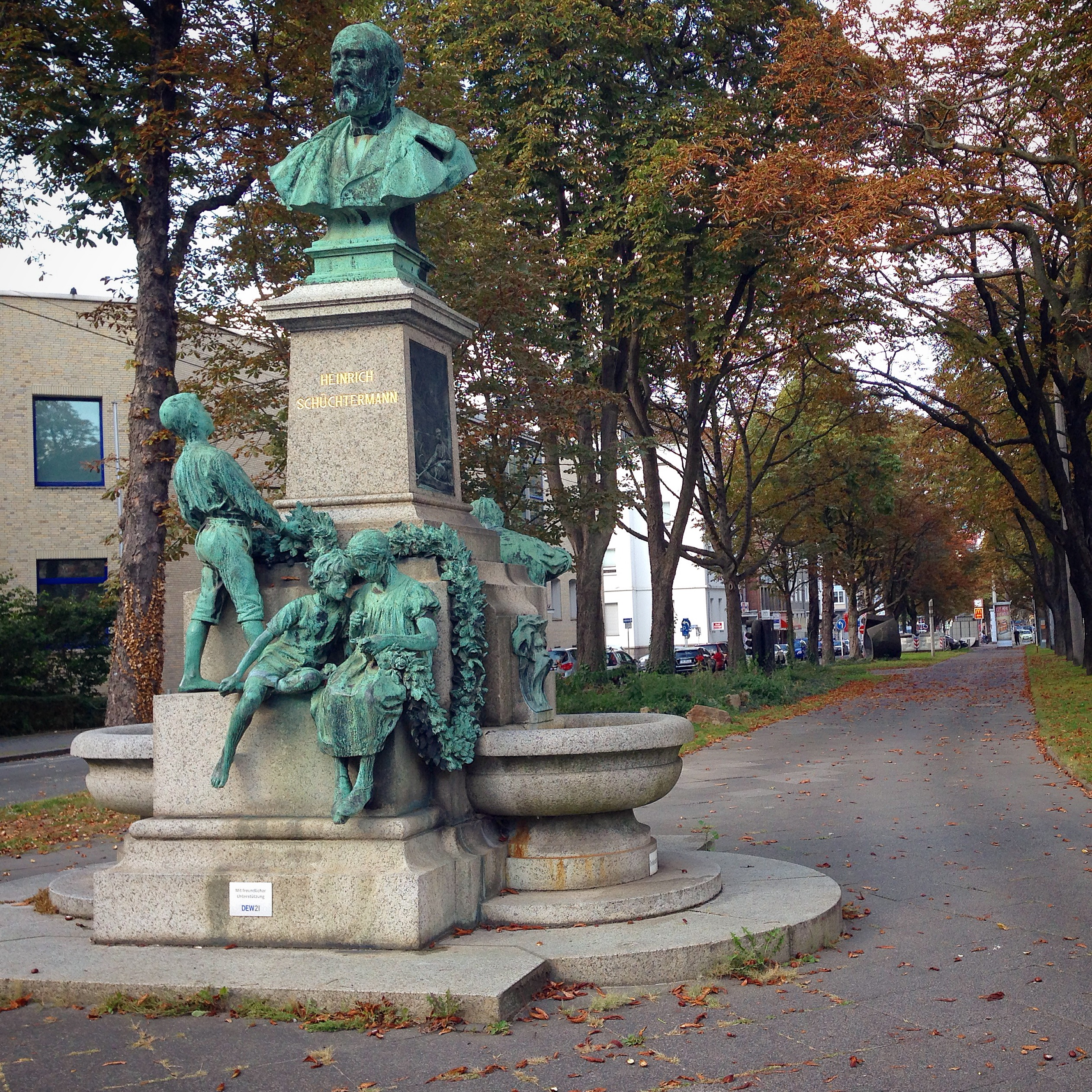 Schüchtermanndenkmal am Ostwall This is a photograph of an architectural monument. 0562